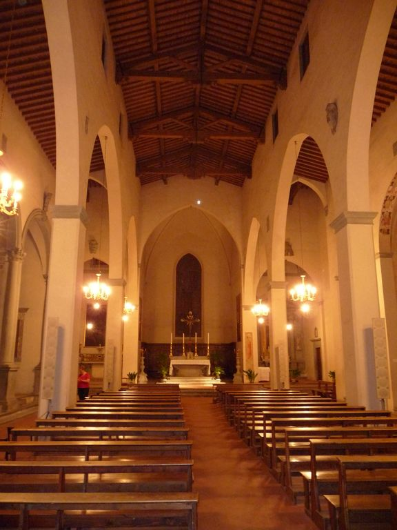 Empoli - Convento degli Agostiniani - Chiesa di Santo Stefano